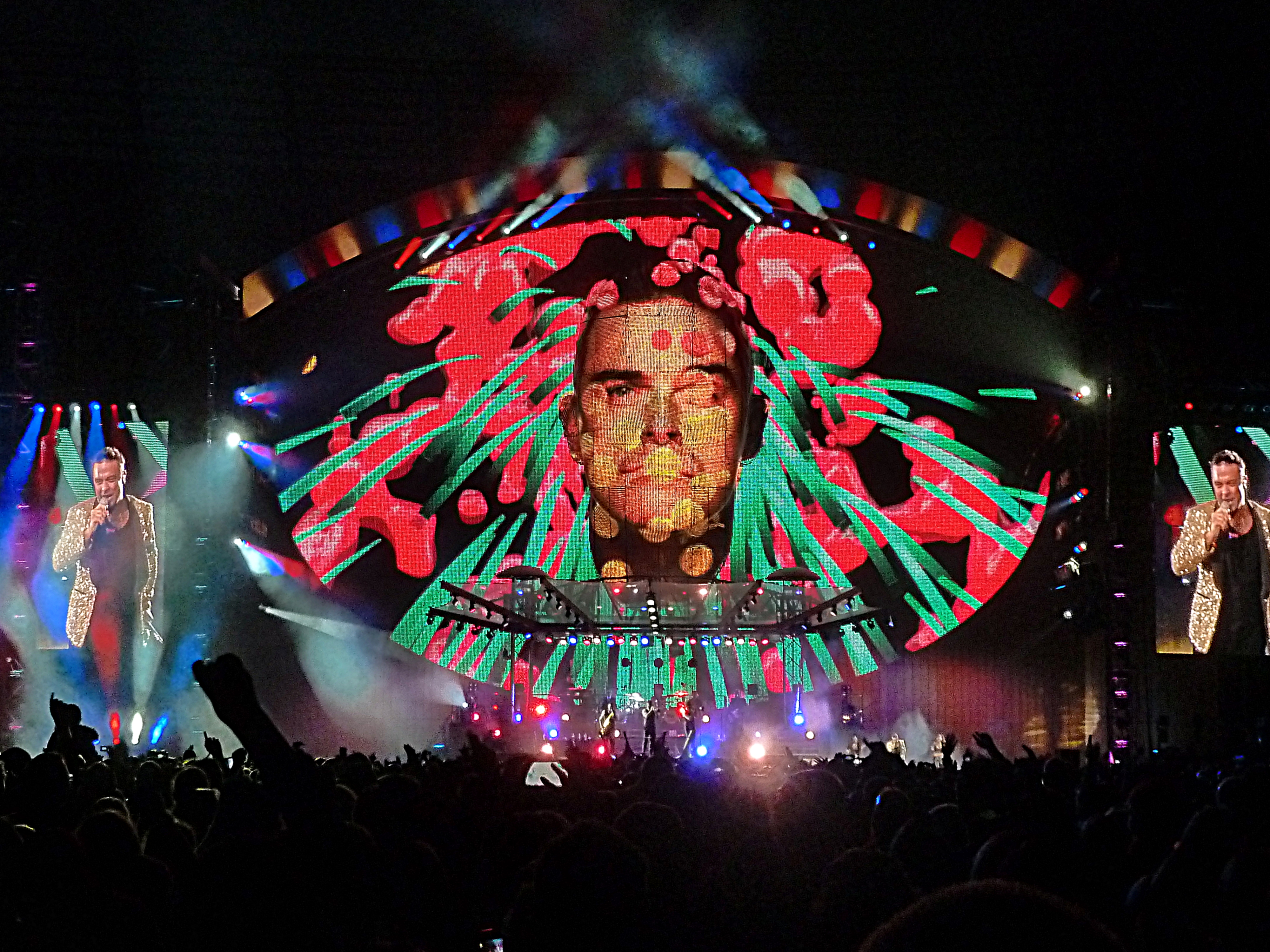 Robbie Williams perfoming 'Candy' in the Manchester Arena, at the Take the Crown Stadium Tour (2013).